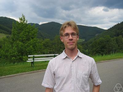 Foto di Tuomas Hytönen